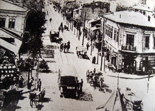 Bucuresti 1900.